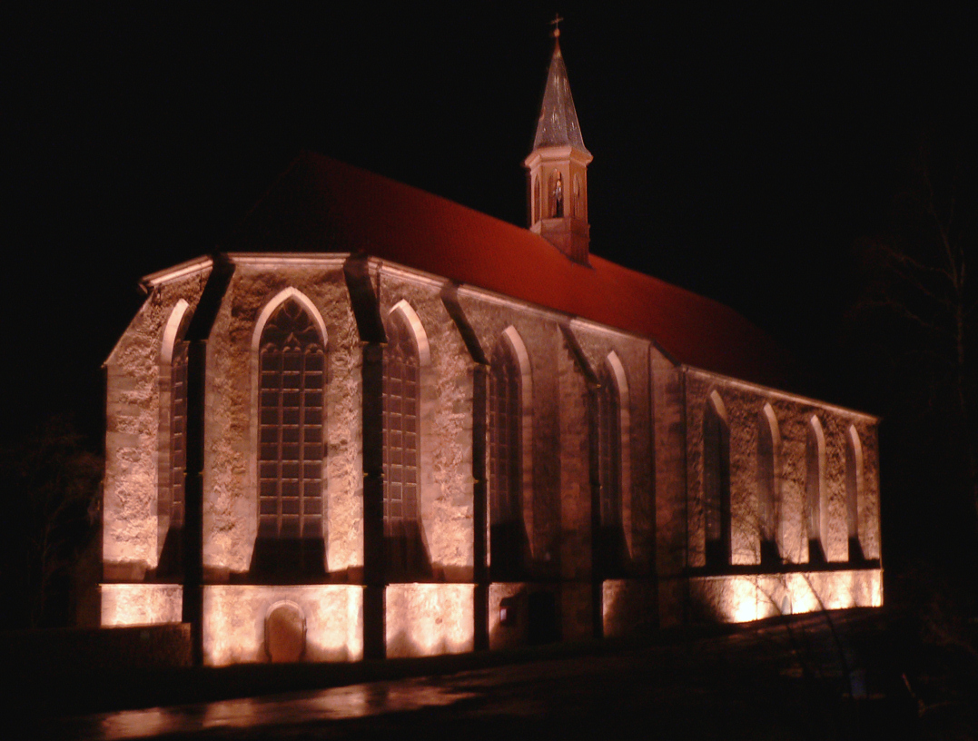 Kloster Wittenburg